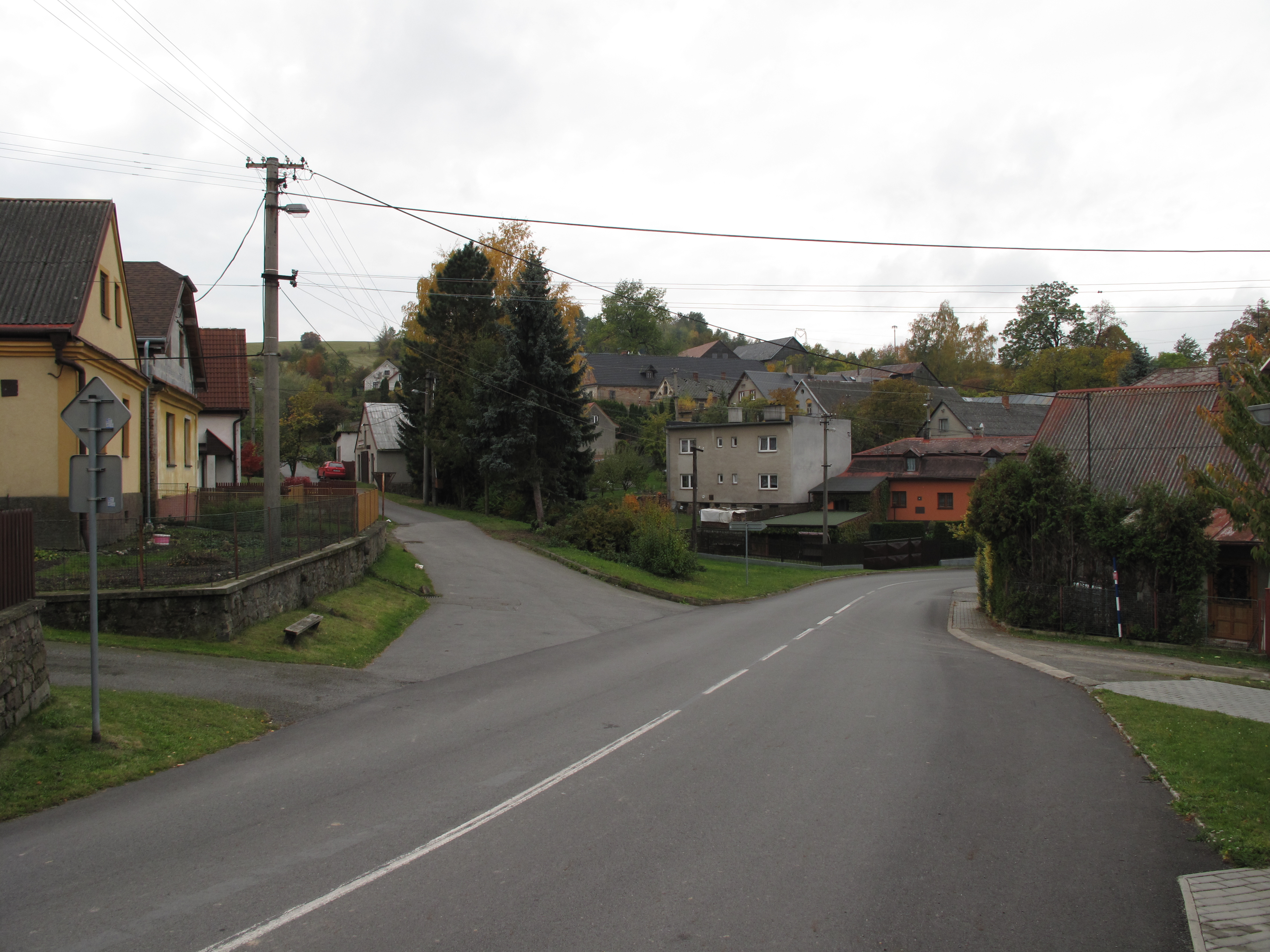 Lhotka u Litultovic. Okres Opava, Česká republika.